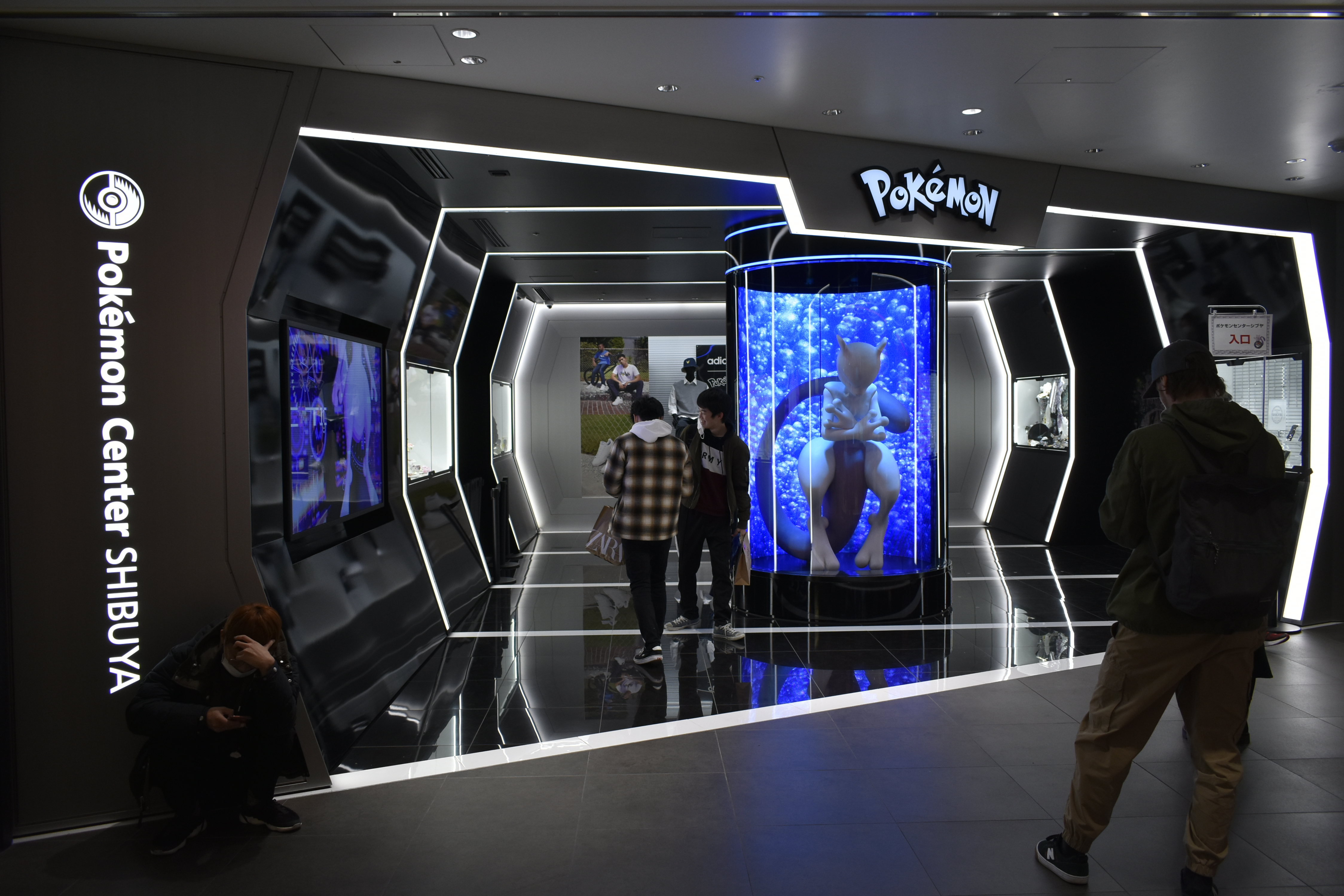 渋谷パルコ